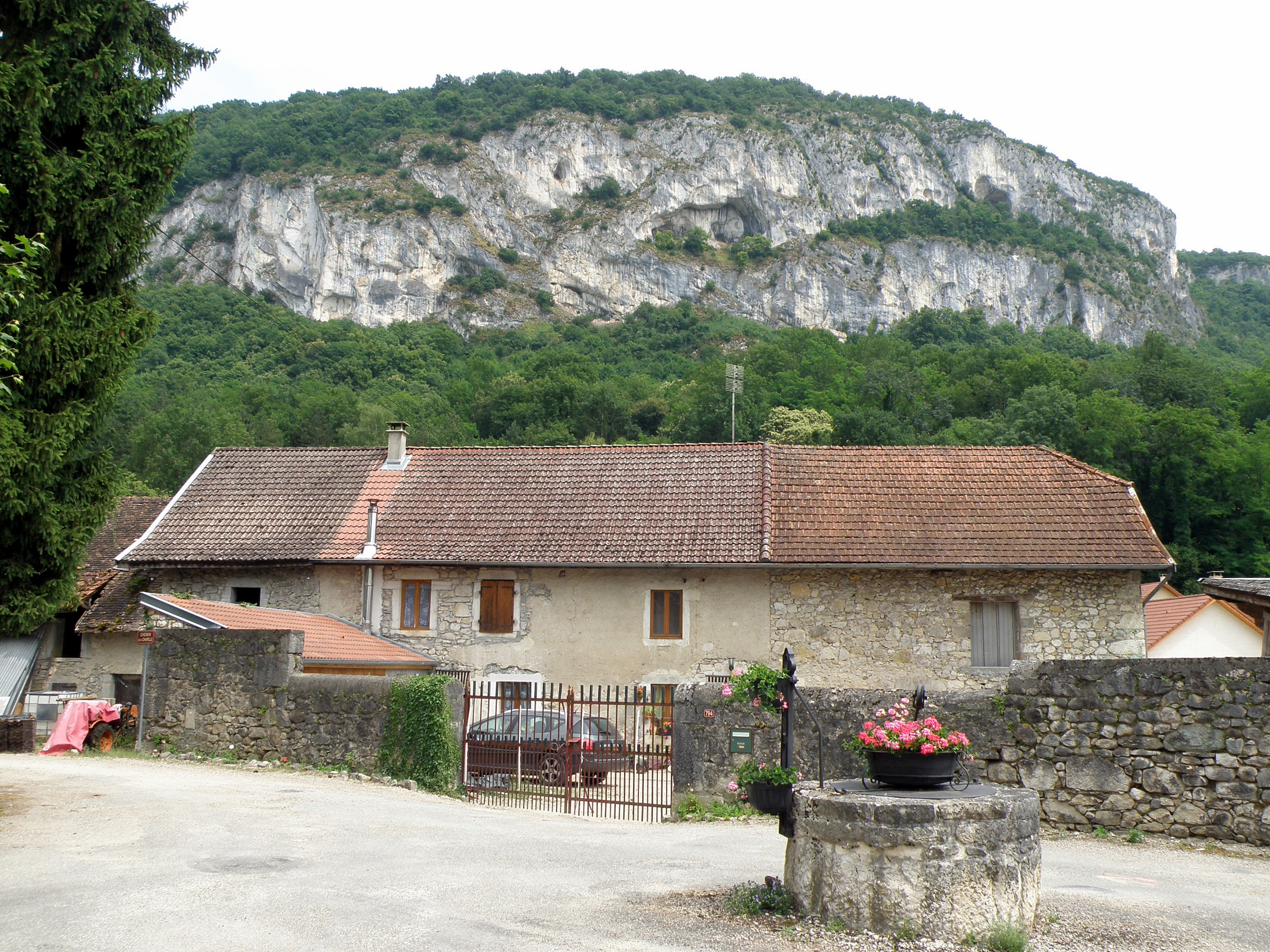 Virignin, commune du département de l’Ain (région Rhône-Alpes, France). Hameau de la Saume. Au fond, la montagne de Parves.